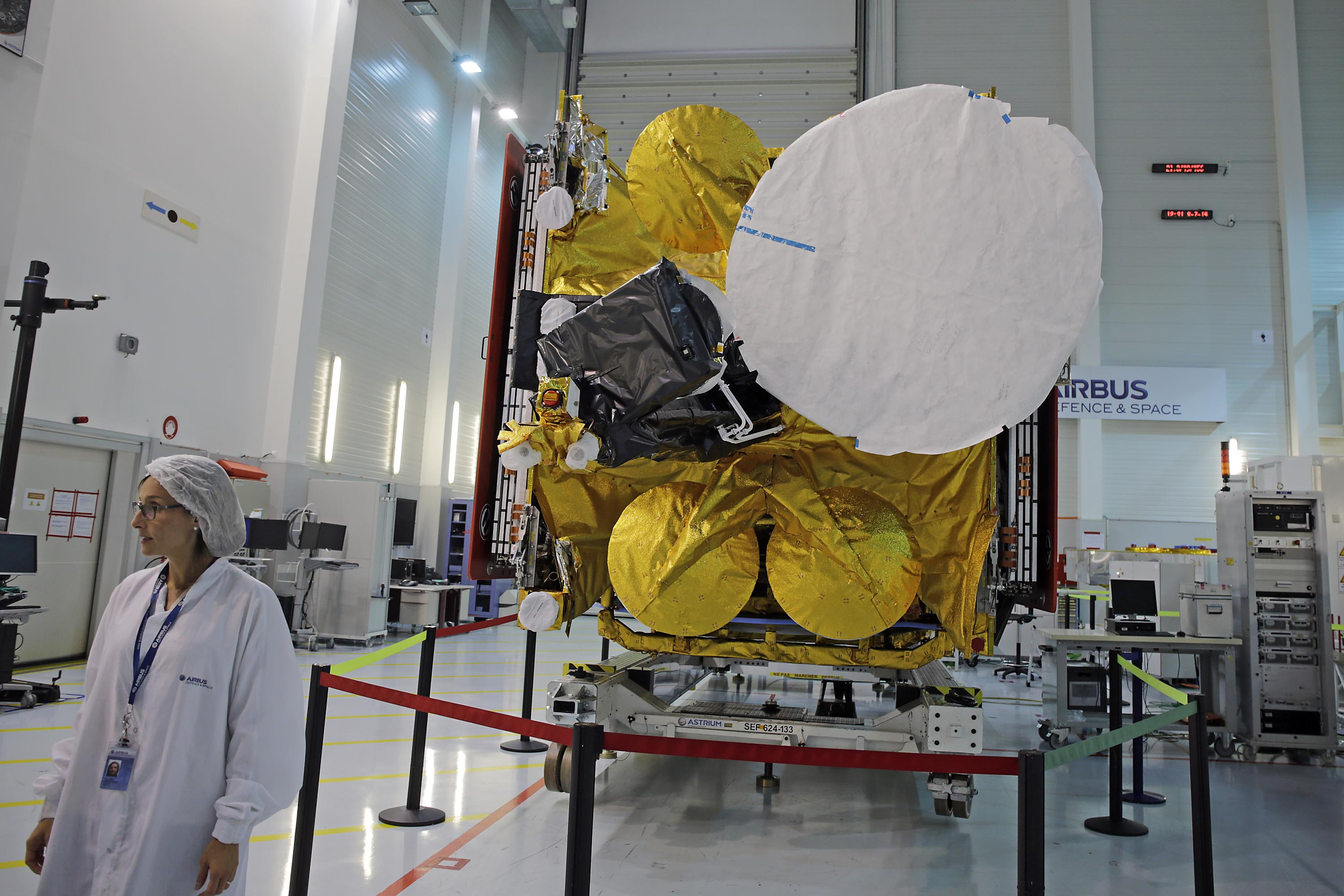 El Ministro de Defensa, Pedro Cateriano Bellido, junto al comandante General de la FAP, General del Aire, Jaime Figueroa y el Mayor General FAP Carlos Rodríguez, jefe del CONIDA, visita la empresa Airbus Defense & Space, en la ciudad de Toulouse, Francia.